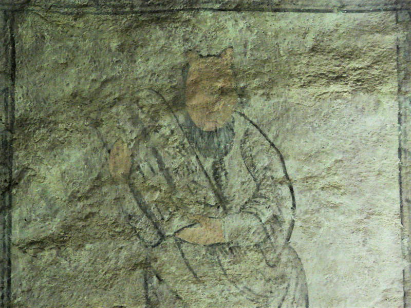 Kalkmaleri, Moses, Sankt Laurentii kirke, Falkenberg, Halland